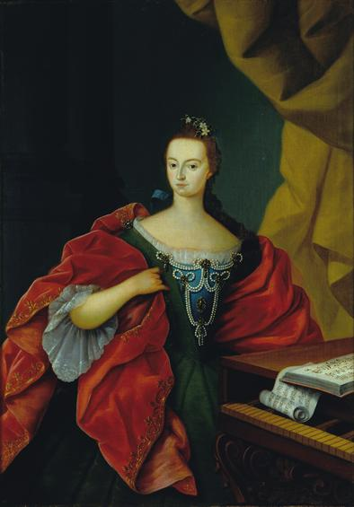 Retrato de D.Maria Ana Josefa, filha Jose I